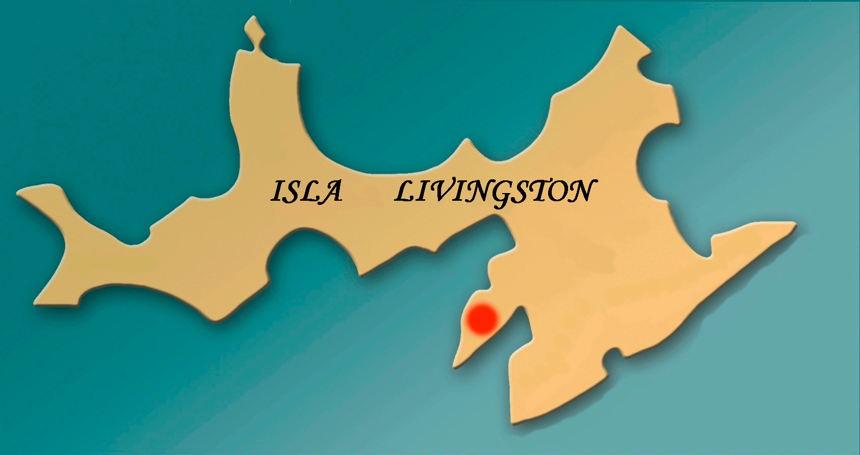 Croquis en el que se muestra la ubicación de la Península Hurd en la isla Livingston de la Antartida